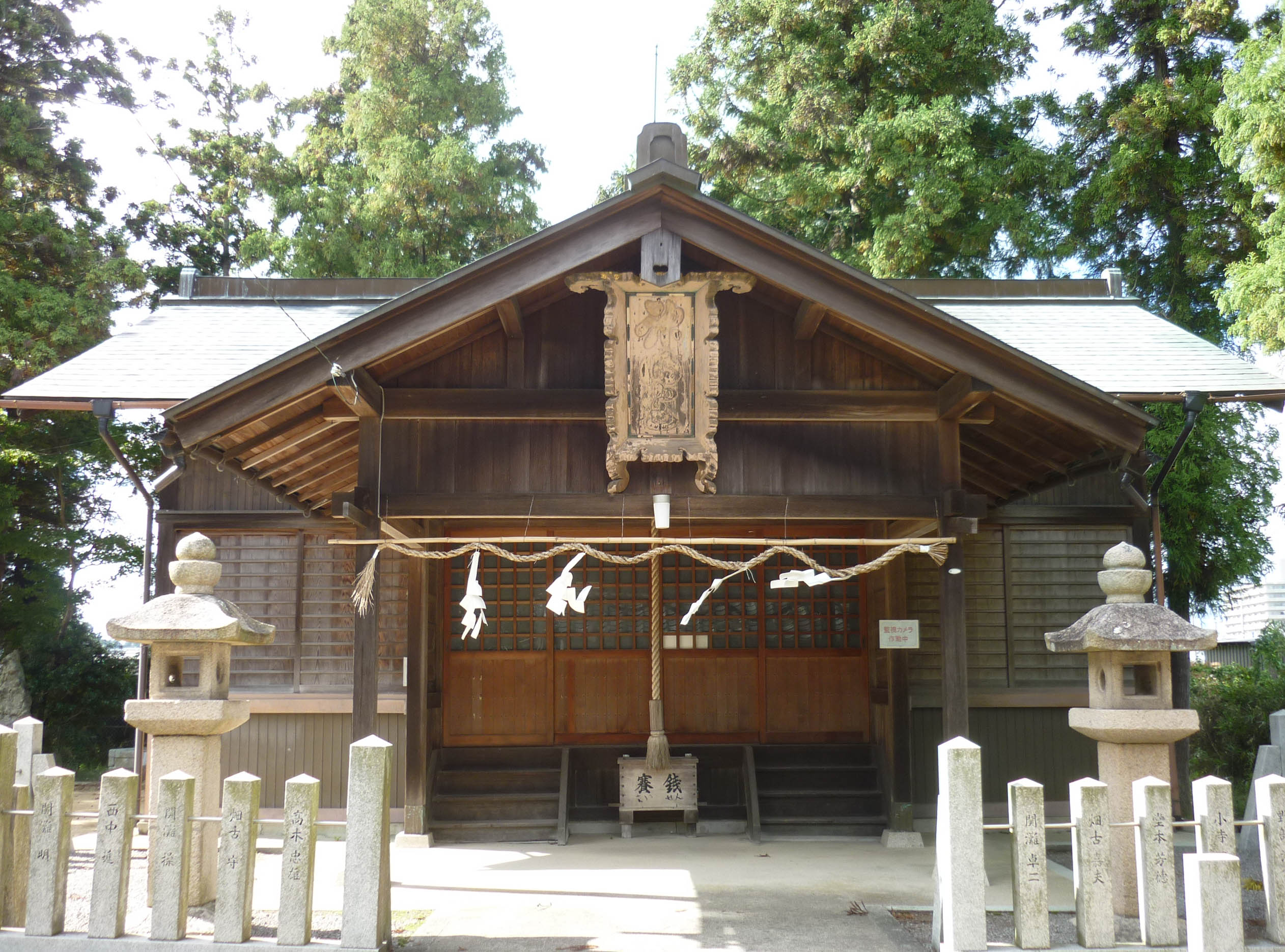 神明神社の拝殿